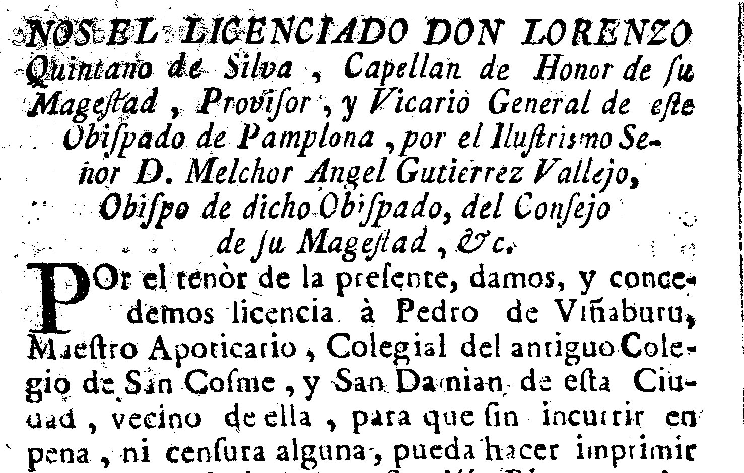 viñaburu en colegio de san cosme y san damian